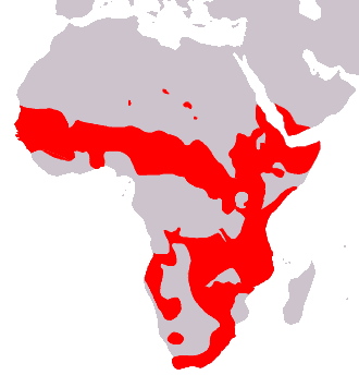 Carte de répartition de l'ensemble des espèces du genre Papio.